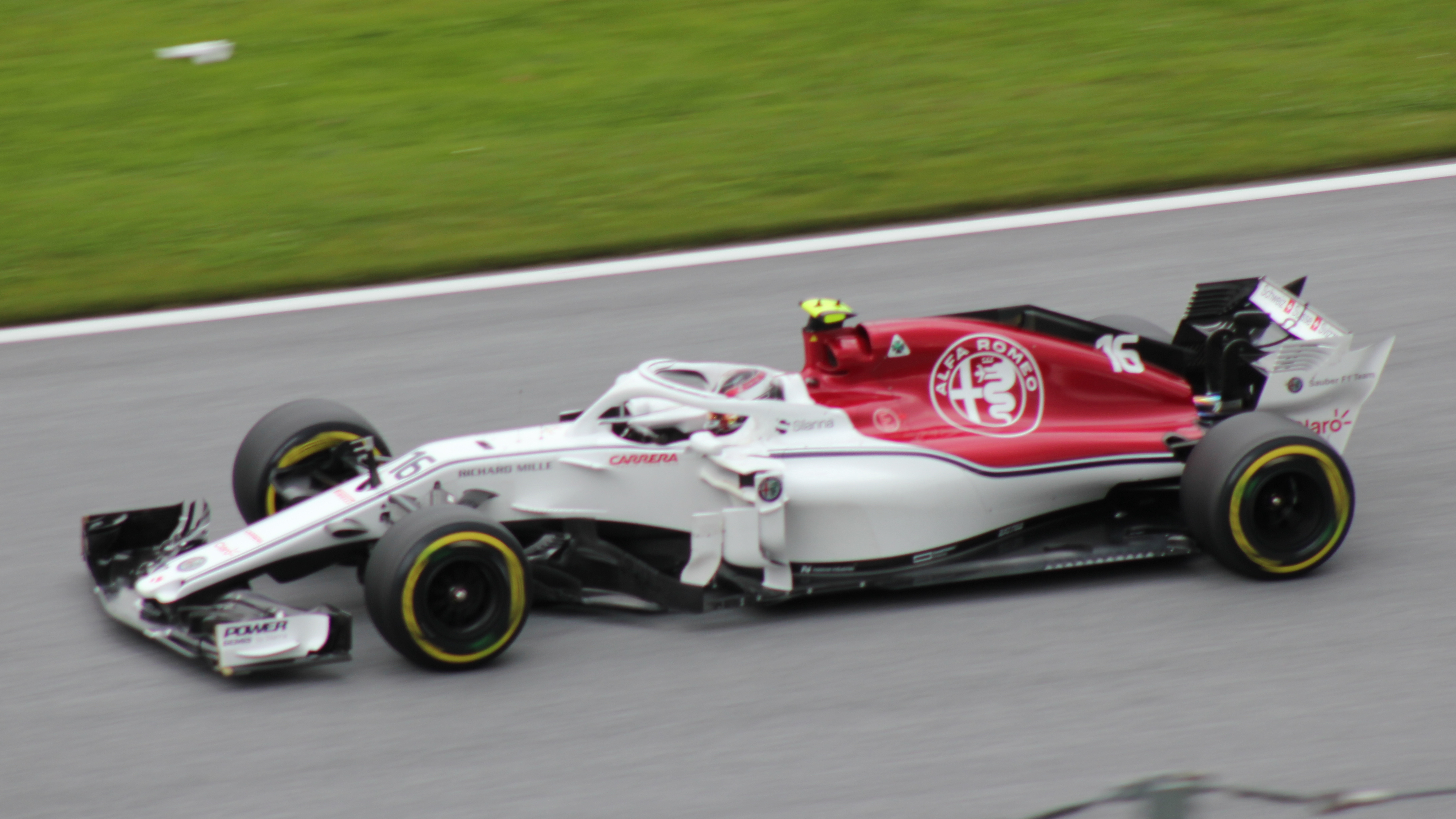 16 Leclerc beim Rennwochenende in Österreich 2018